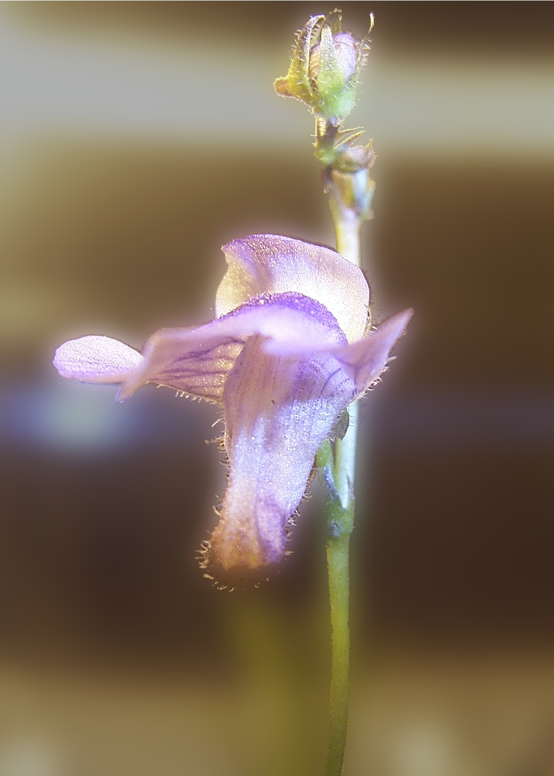 Genlisea subglabra flora